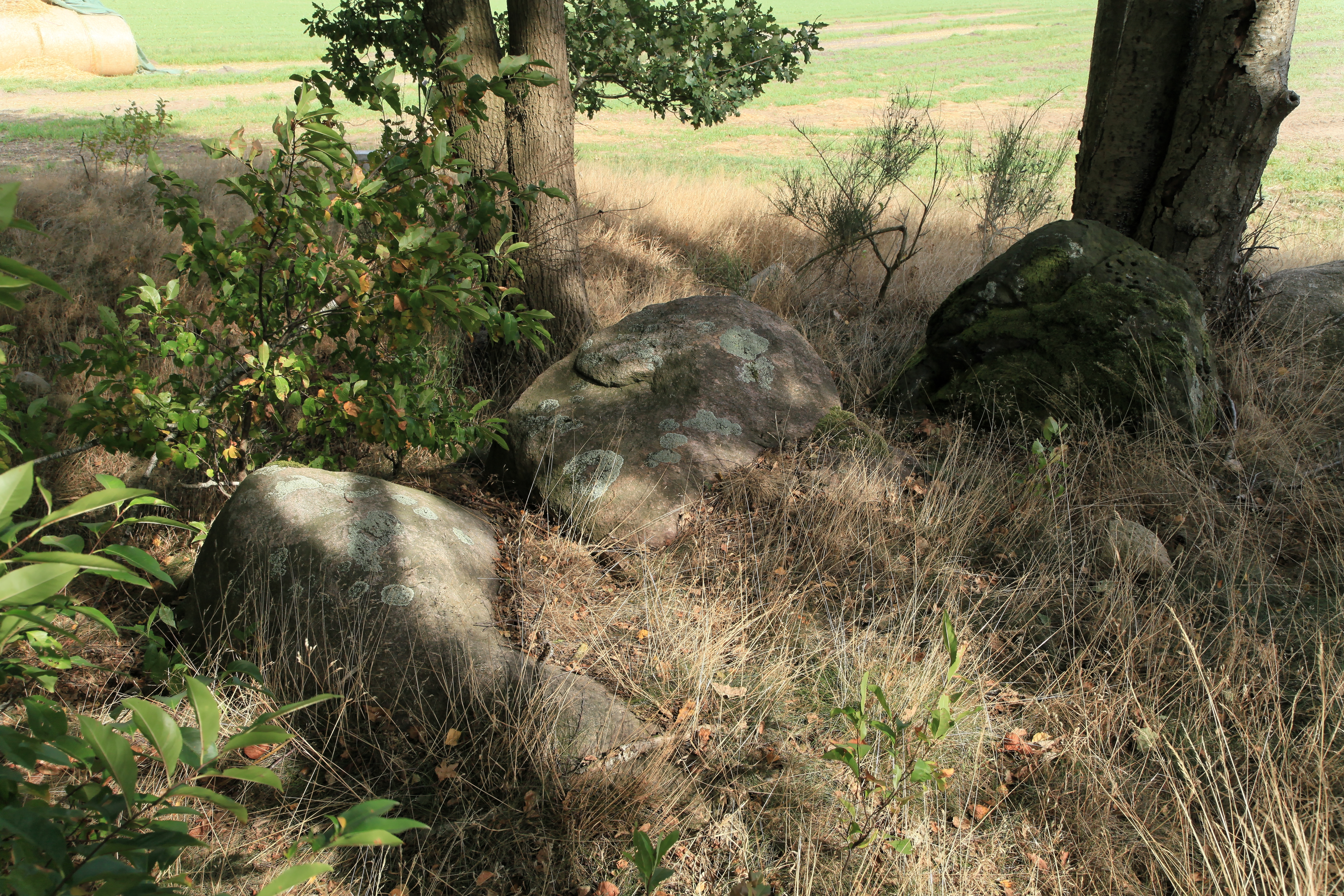 Großsteingrab Spahn II (Steenberg) in Spahnharrenstätte